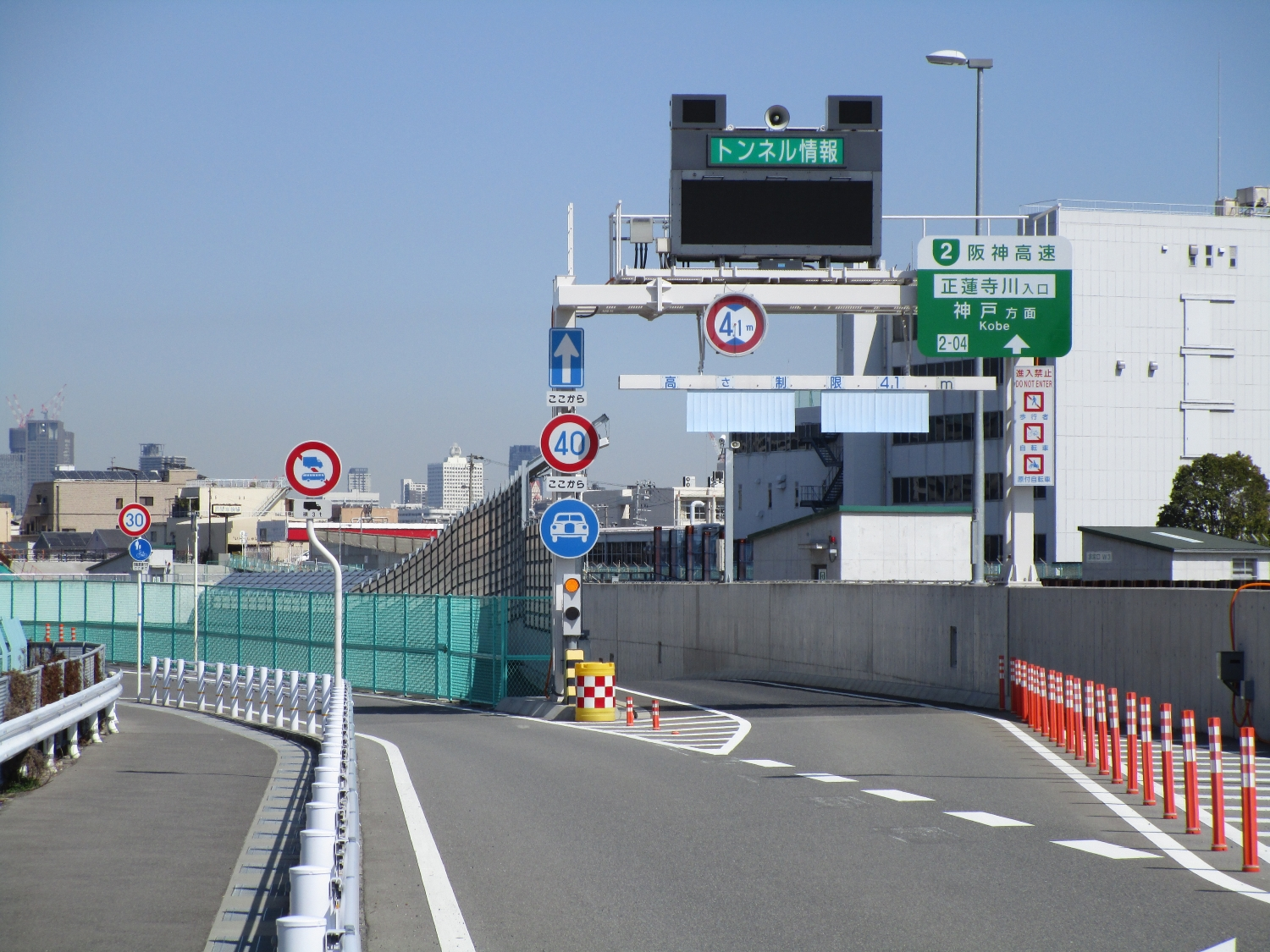 阪神高速2号淀川左岸線・正蓮寺川入口